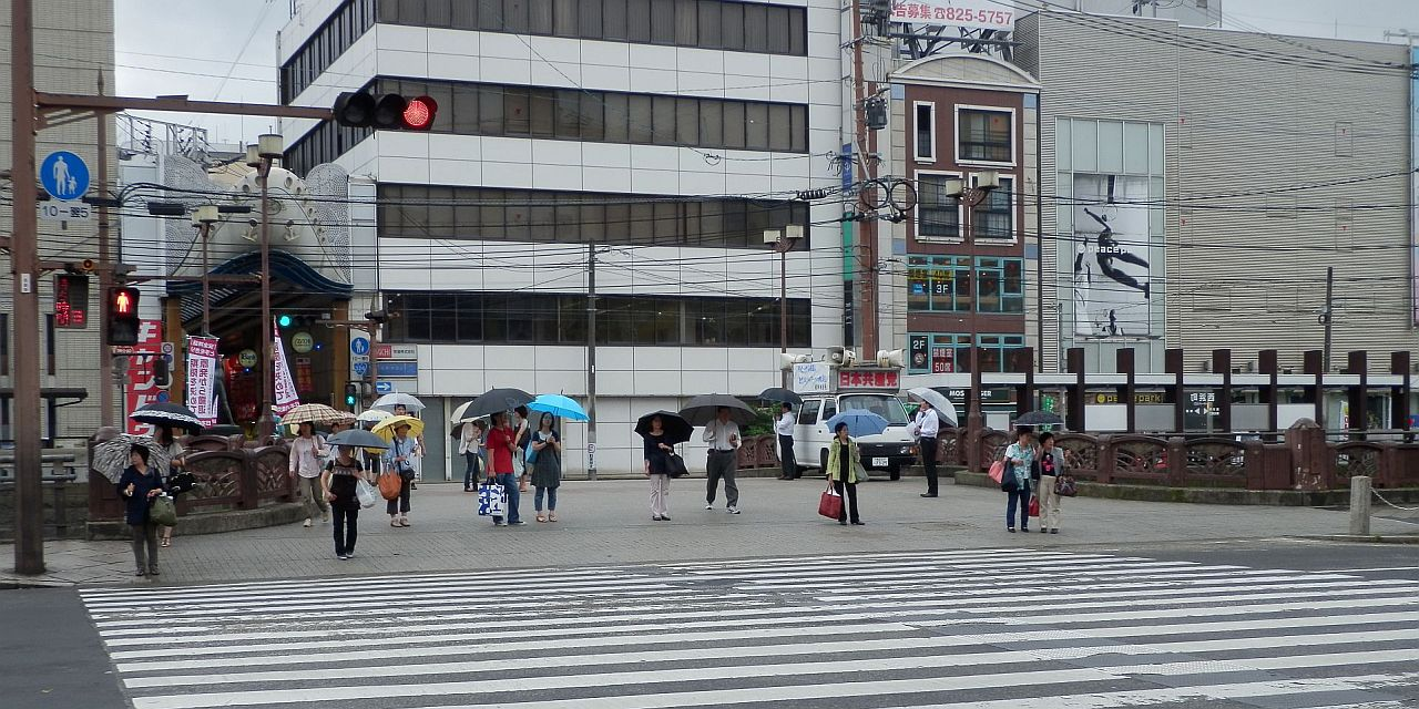 長崎市の銕橋(くろがねばし) (Kurogane bridge in Nagasaki Japan)